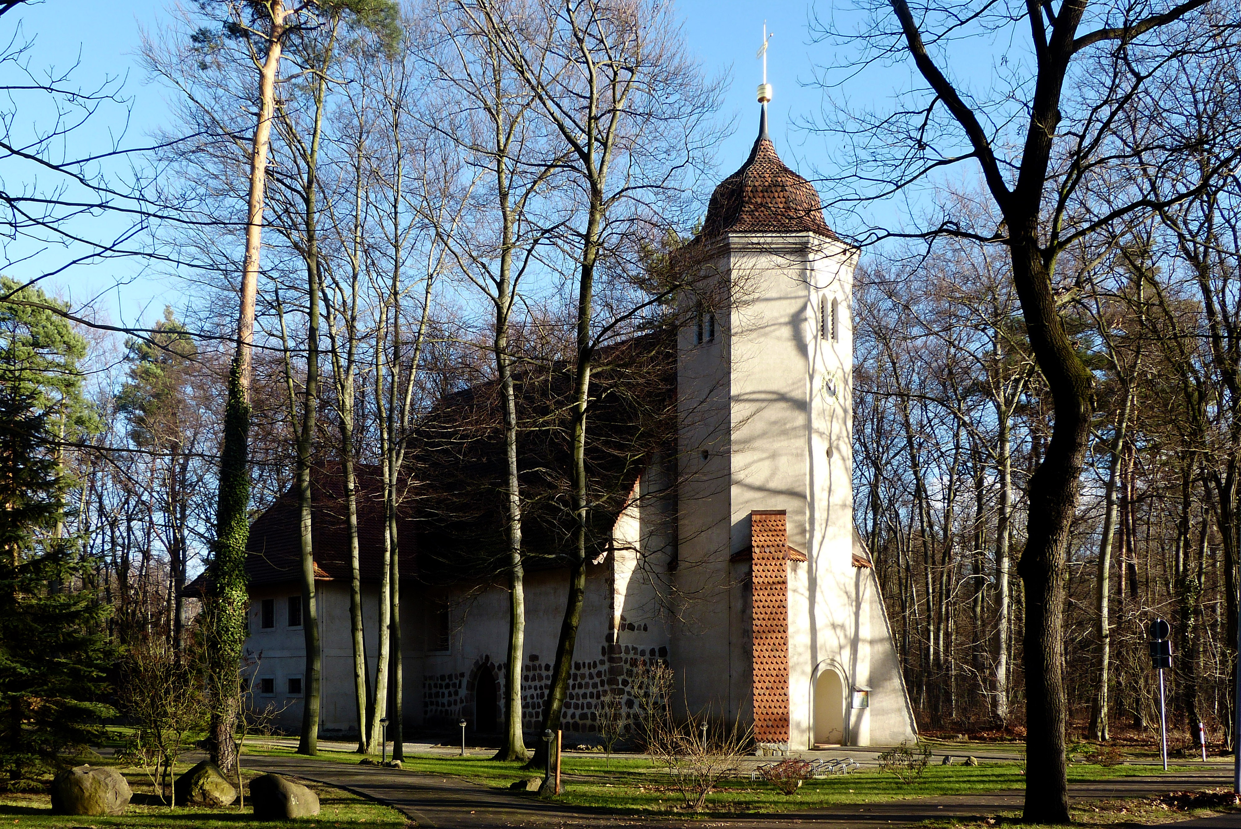 Ehemalige Dorfkirche Pritzen am neuen Standort Spremberg als Auferstehungskirche Spremberg.